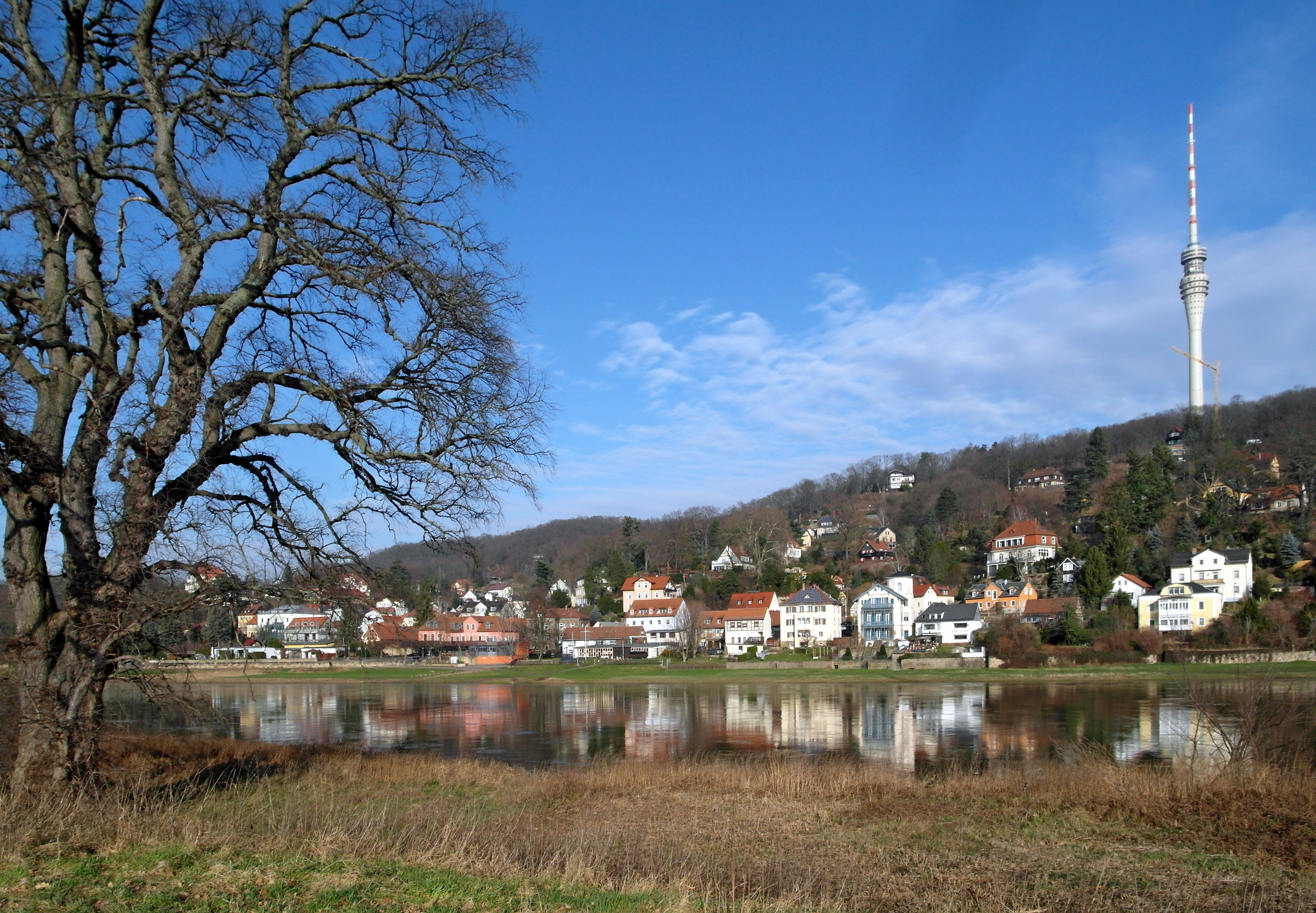 11.01.2018 01279 Dresden-Tolkewitz: Blick vom Tolkewitzer Elbufer (GMP: 51.034806,13.832384) über die Elbe nach Wachwitz mit dem Fernsehturm (GMP: 51.040014,13.838857).[SAM3520.JPG]20180111320DR.JPG(c)Blobelt